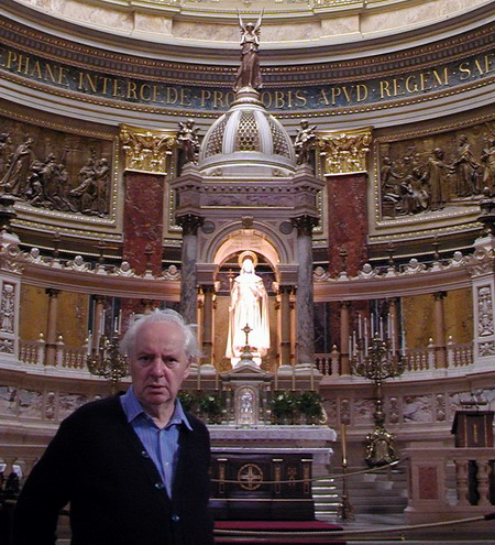 Koós Gyula fényképészmester, a Szent István-bazilika fotósa a templomban